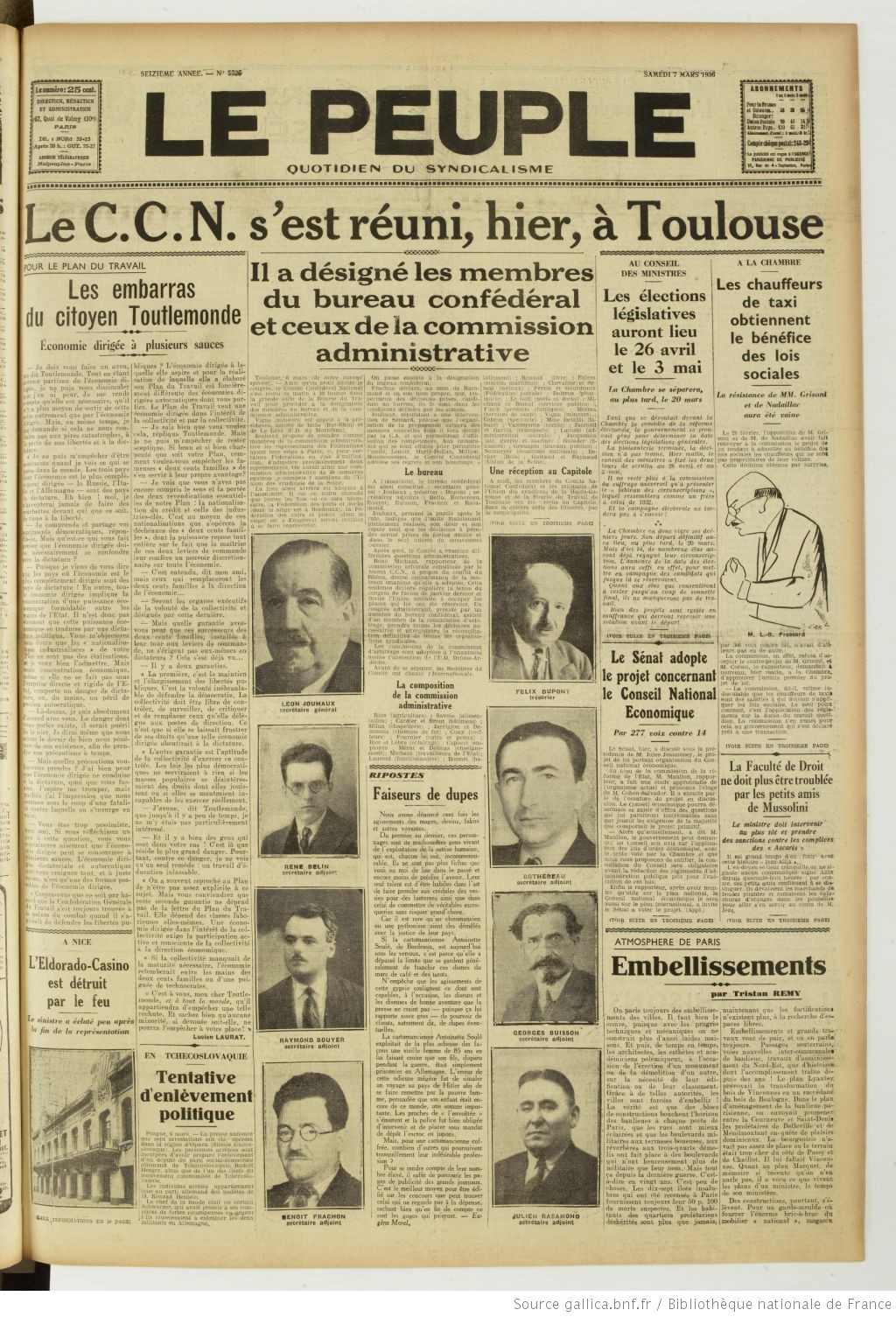 Le bureau confédéral est élu par le Comité confédéral national, qui se réunit après le Congrès de Toulouse. Il comprend le secrétaire général, 6 secrétaires adjoints et le trésorier.Le Peuple, journal de la CGT, le présente en première page le 7 mars 1936